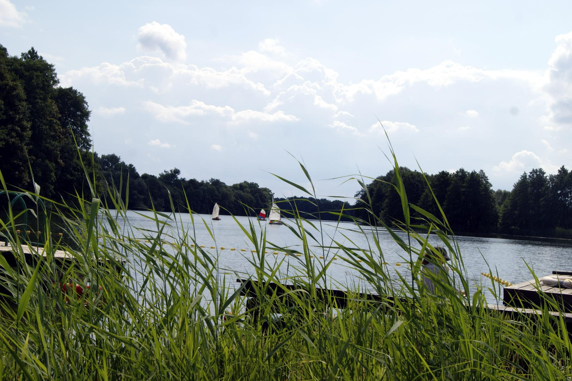 Pierwsze żeglarskie kroki